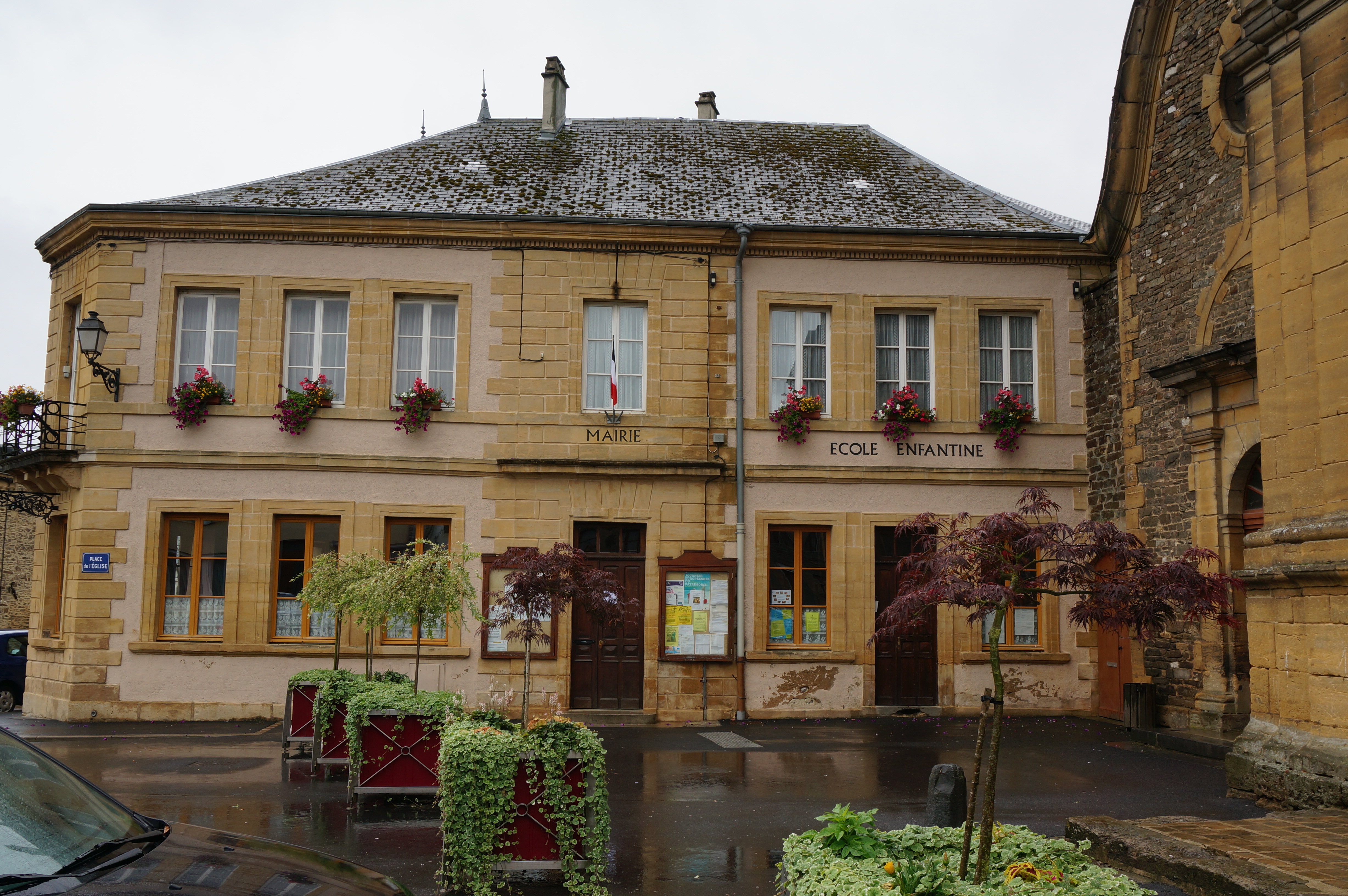 Monument du village .